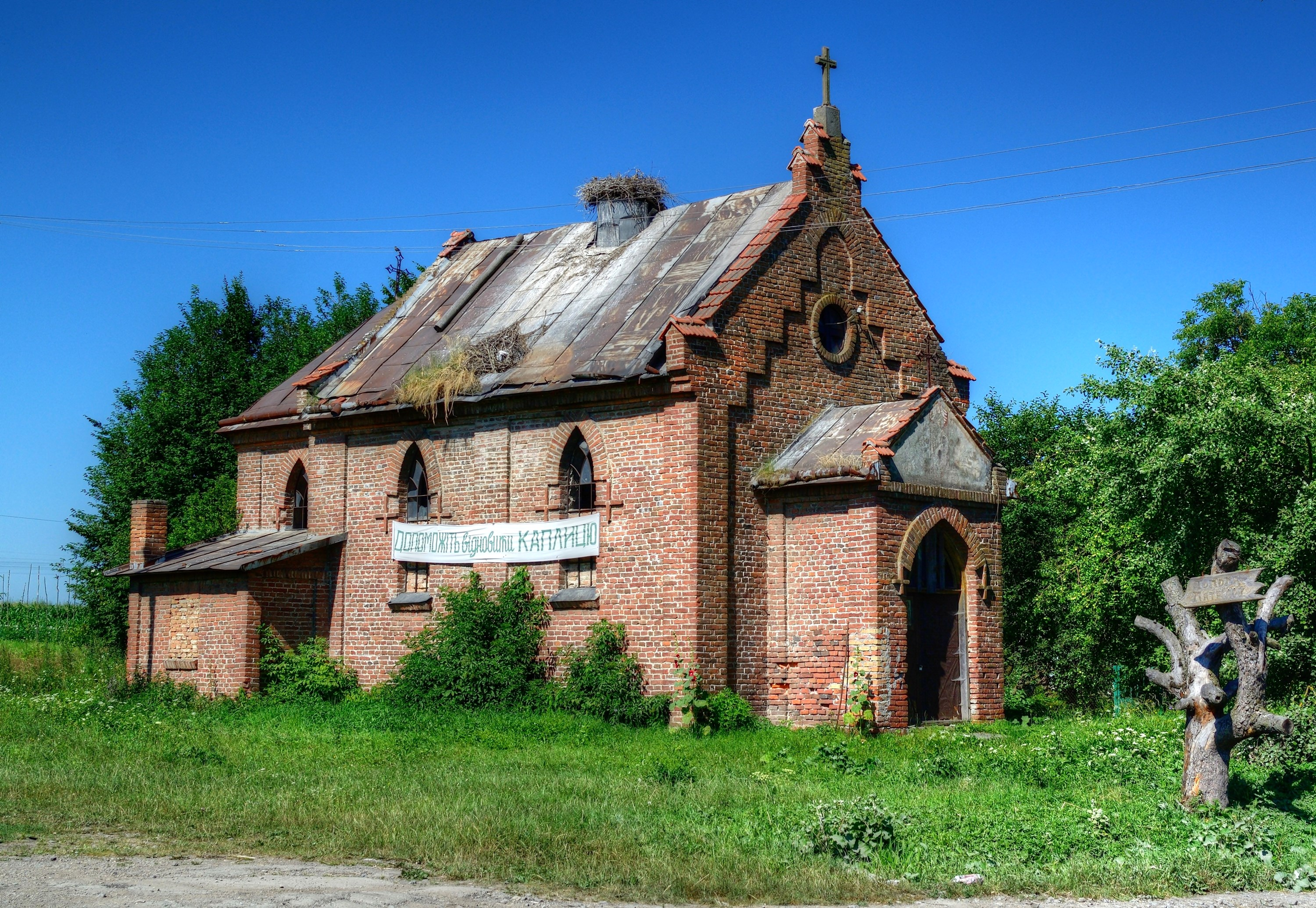 Каплиця в селі Репехів